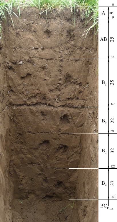 Схема профиля пойменной дерново-глееватой почвы; пойма р. Томь близ с. Коларово, Томский район, Томская обл.